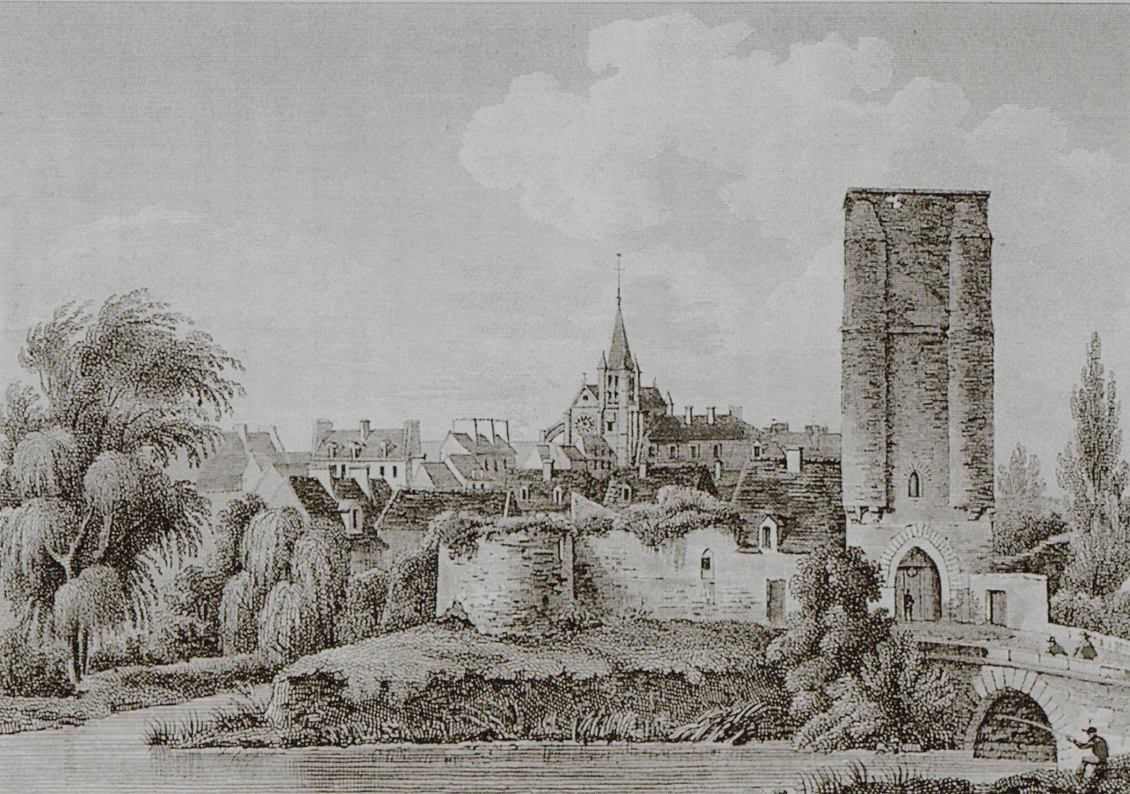 Ville de Brie Comte Robert au XX siècle